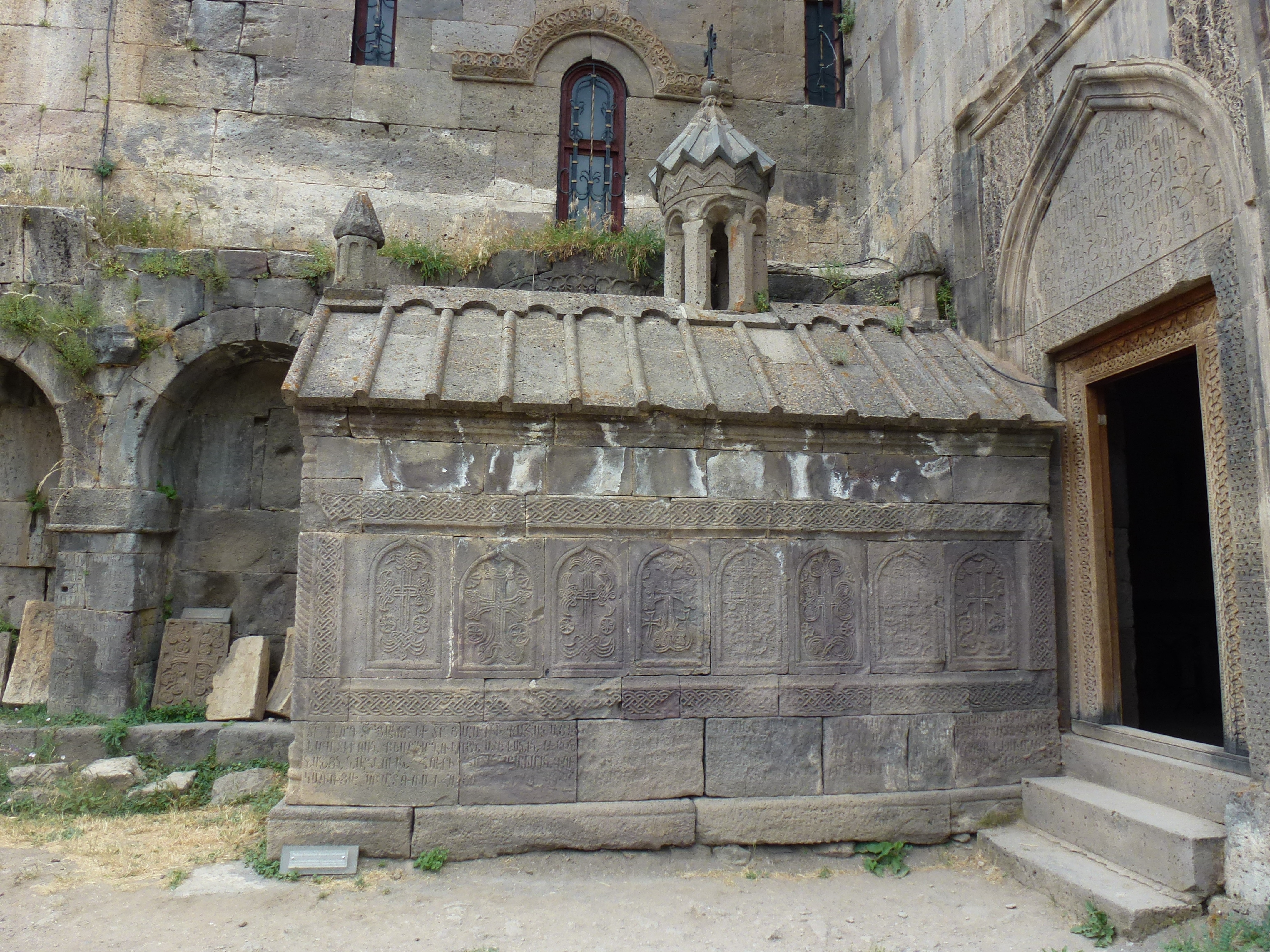 Տաթևի վանական համալիր, Հայաստան 97/9.6